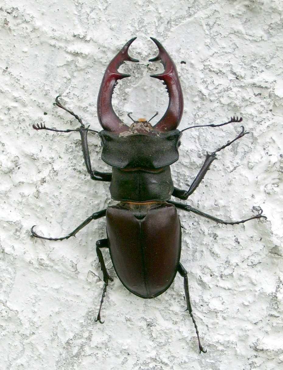 Hirschkäfer in Übach-Palenberg